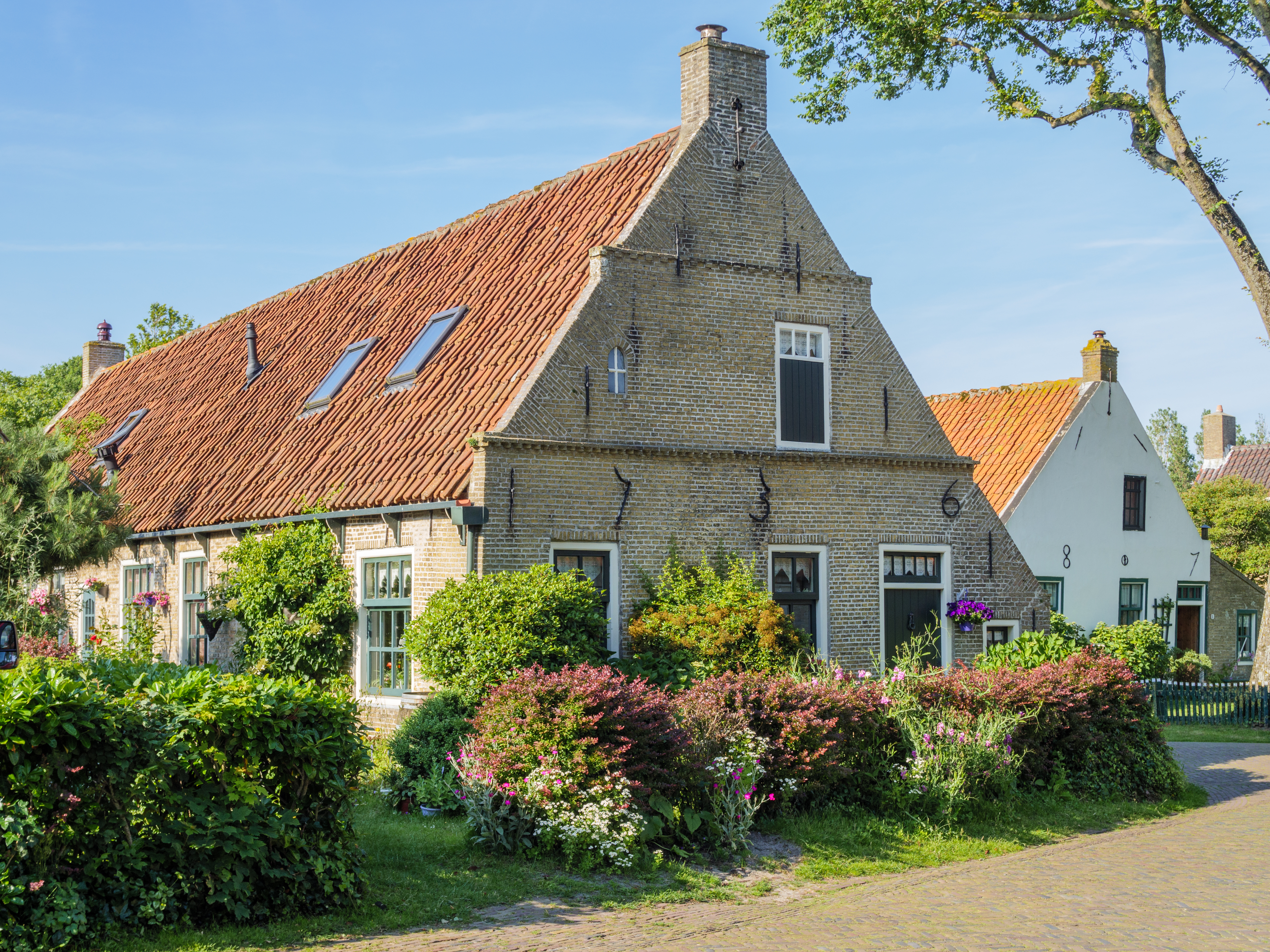 Gerrit Kosterweg 10/12, Ballum (Ameland)